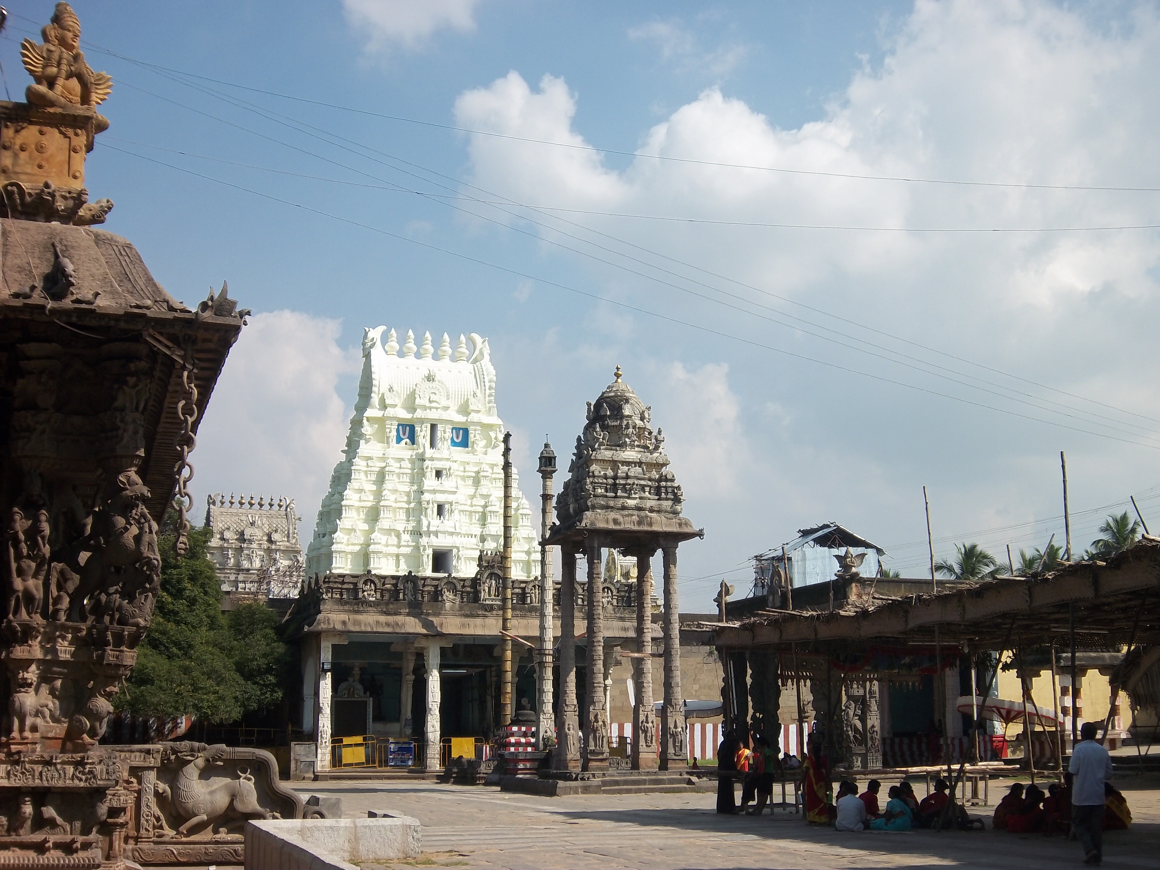 காஞ்சிபுரம் வரதராஜப்பெருமாள் கோயில்